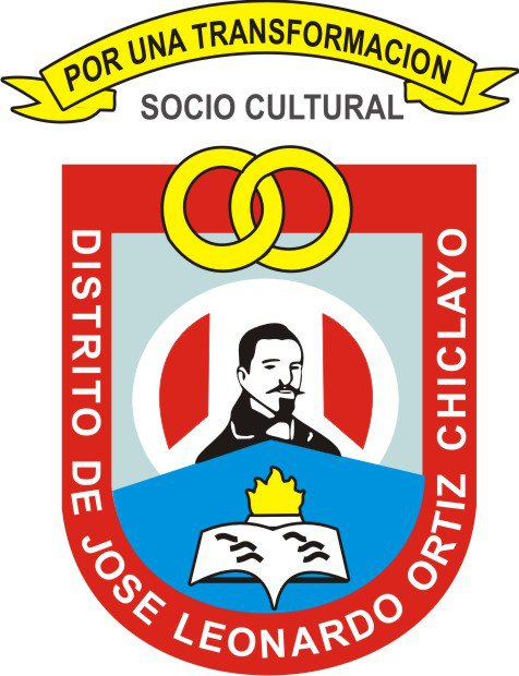 Escudo del Distrito de José Leonardo Ortiz